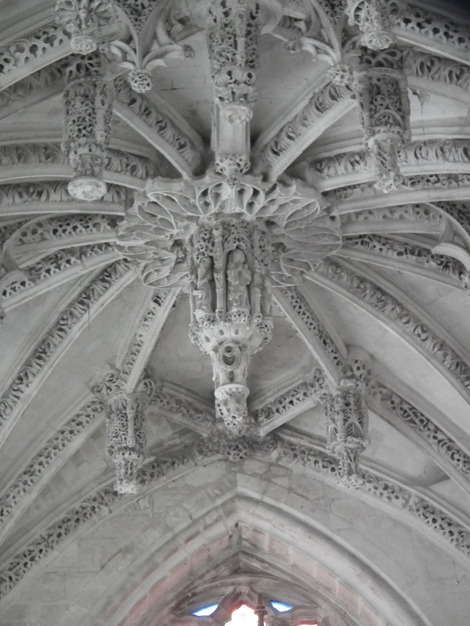 Chapelle du Saint-Esprit, Rue, France